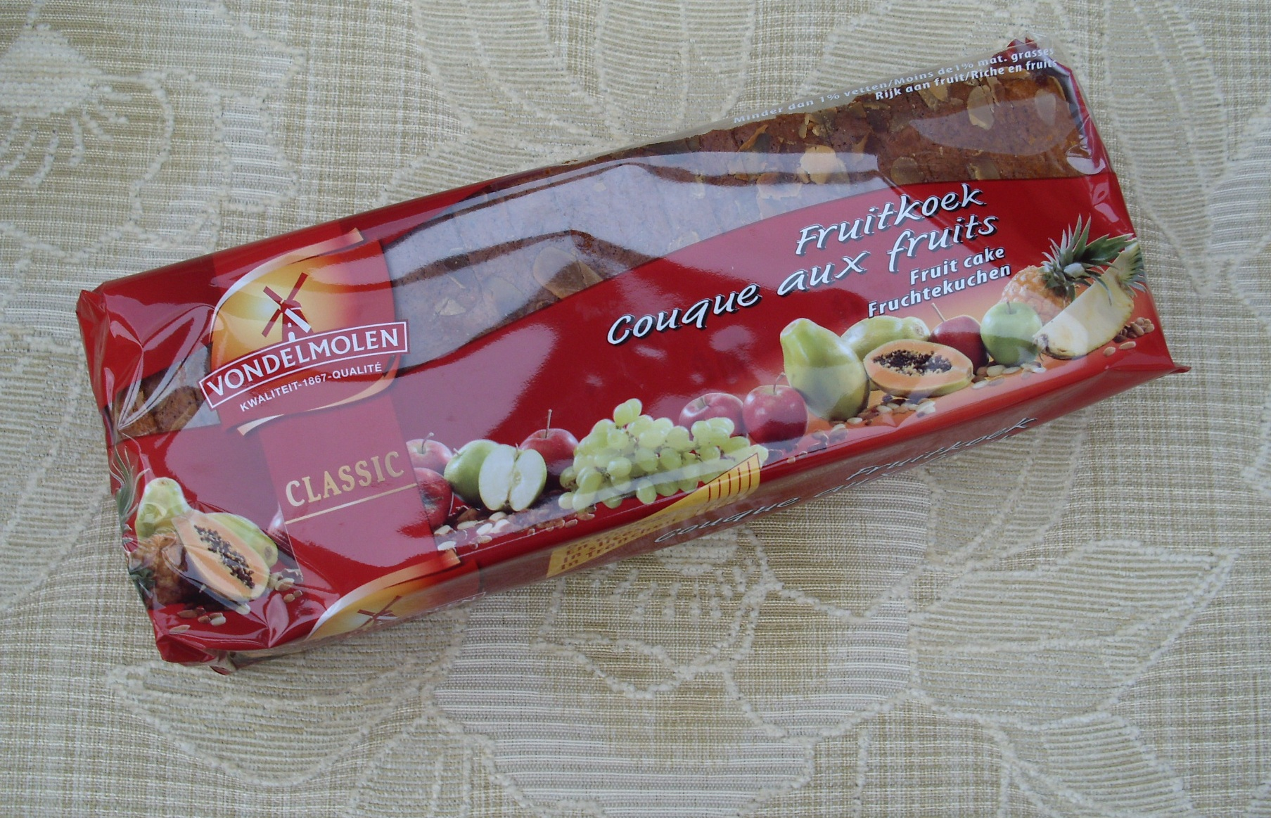 Peperkoek Vondelmolen - Lebbeke - Oost-Vlaanderen - Vlaanderen - België